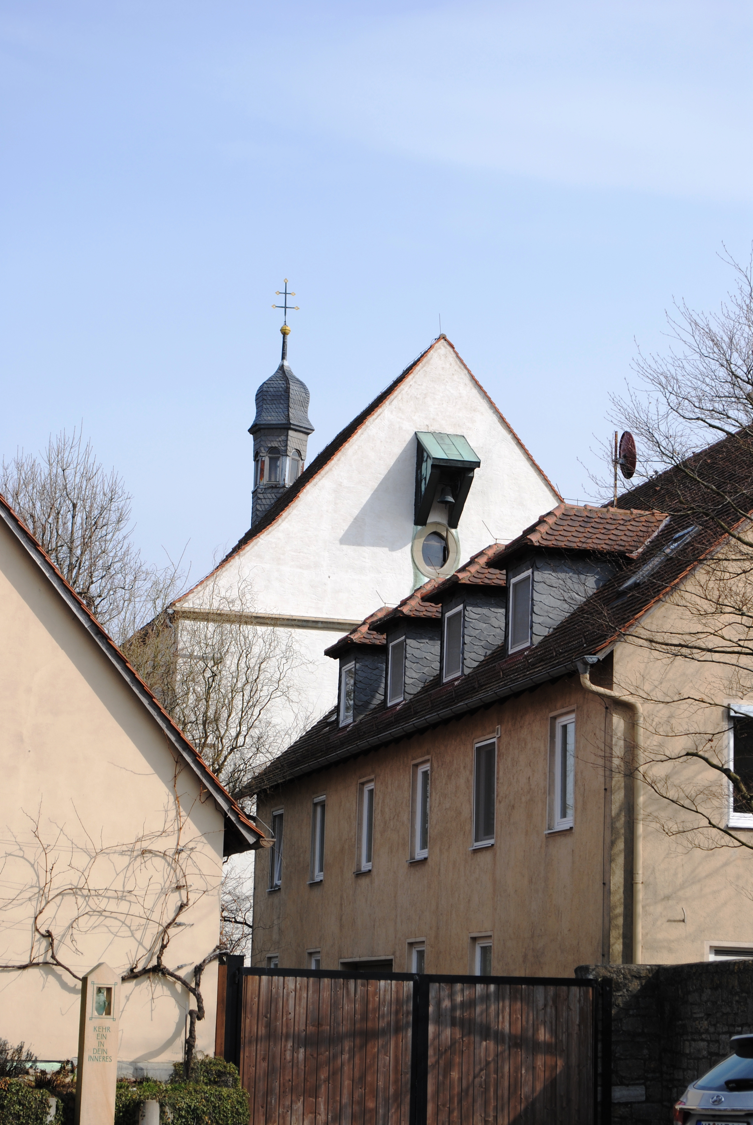 Vogelsburg, Kirche, Volkach, von der spätgotischen Anlage erhalten: die profanierte Kirche mit Kapelleneinbau von 1702